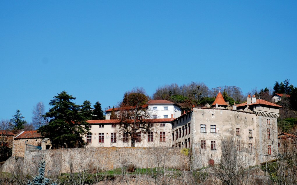 Château de Bellegarde-en-Forez